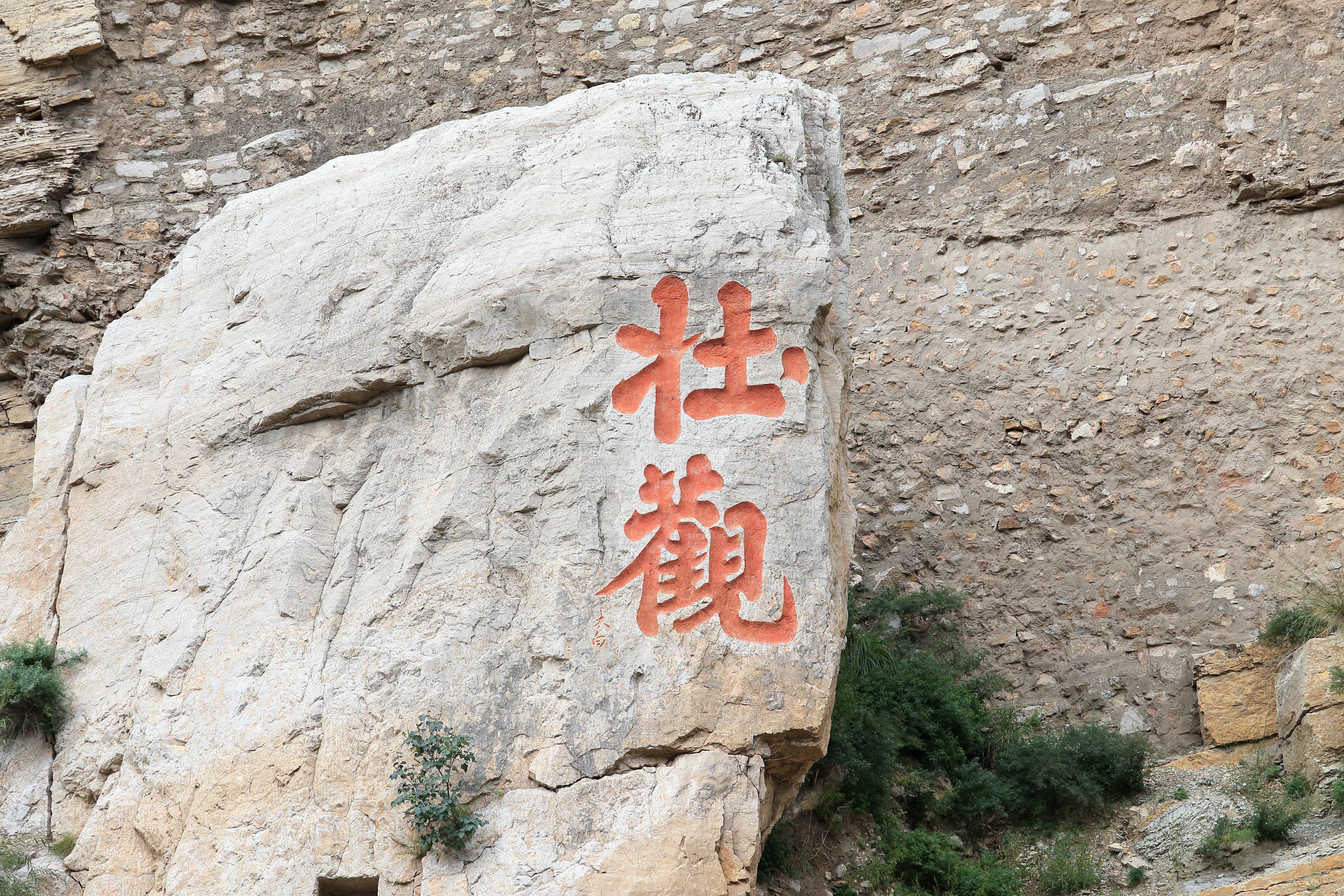 浑源悬空寺——